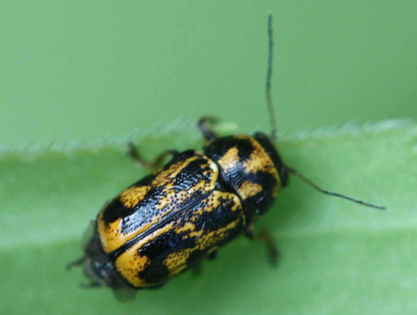 Pachybrachis cf. hieroglyphicus am 4.6.2017 am Rheinufer südlich von Mannheim